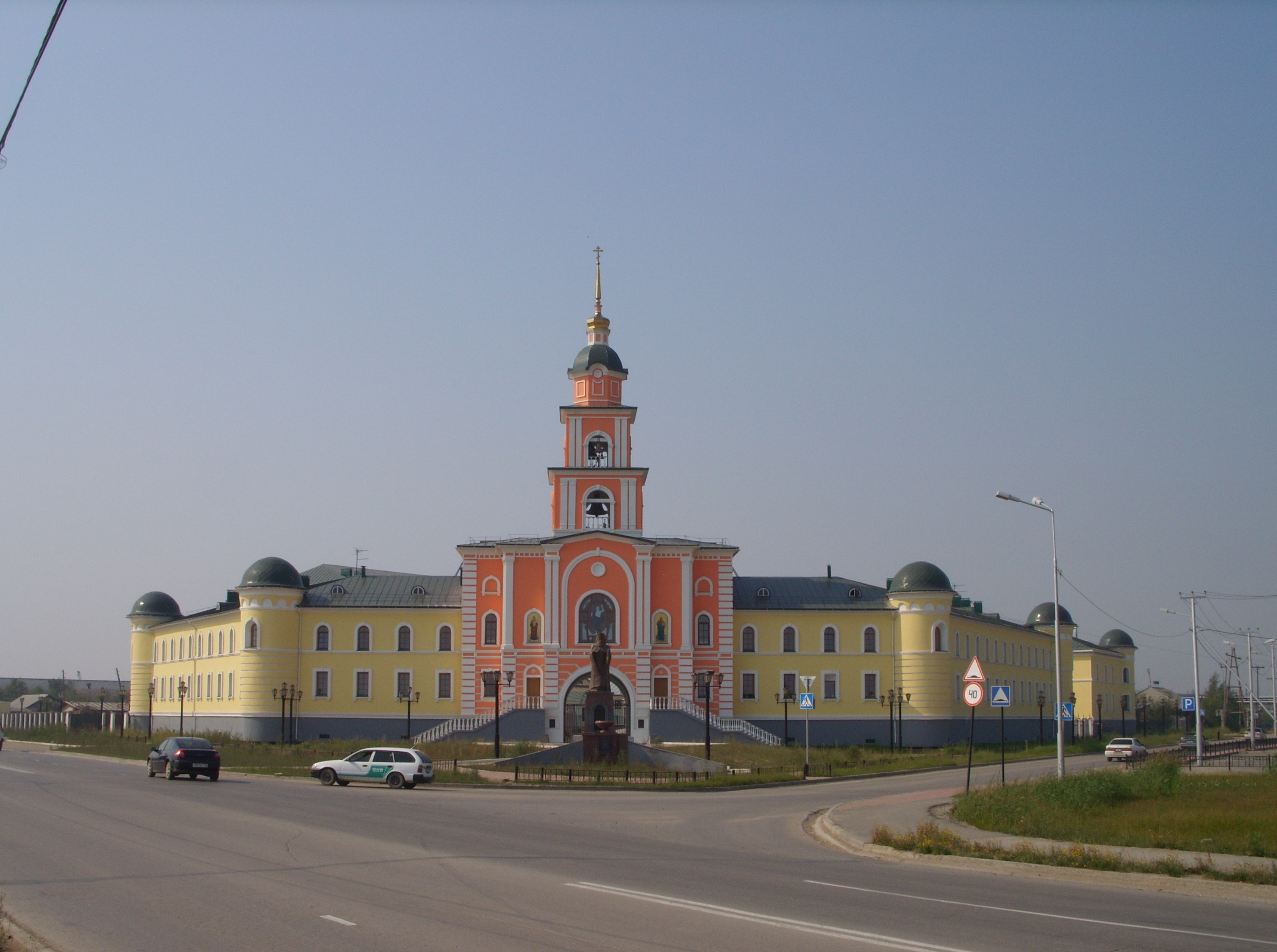 по ул. Чернышевского